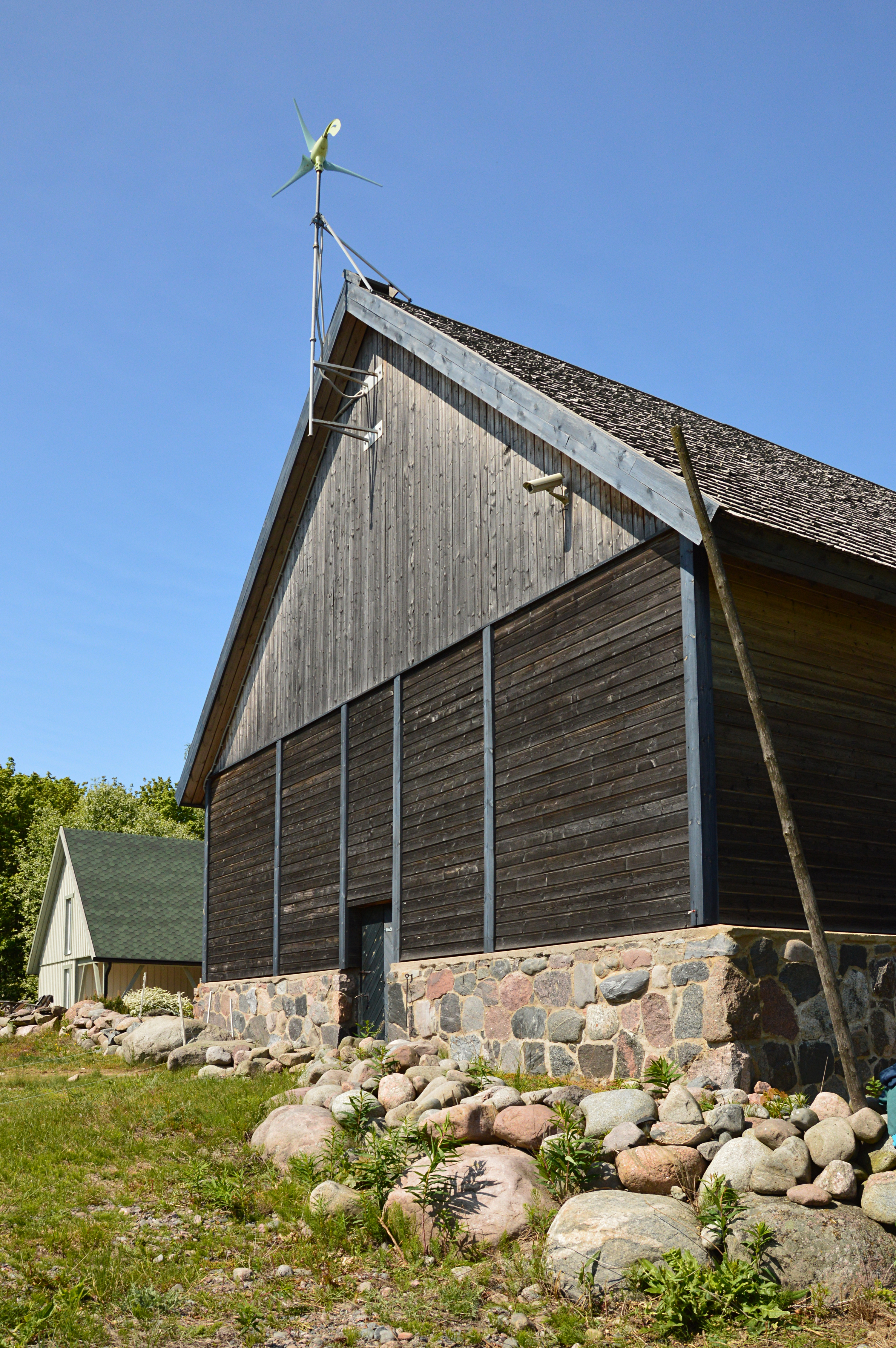 Omari küün Naissaarel. Lõunakülg.